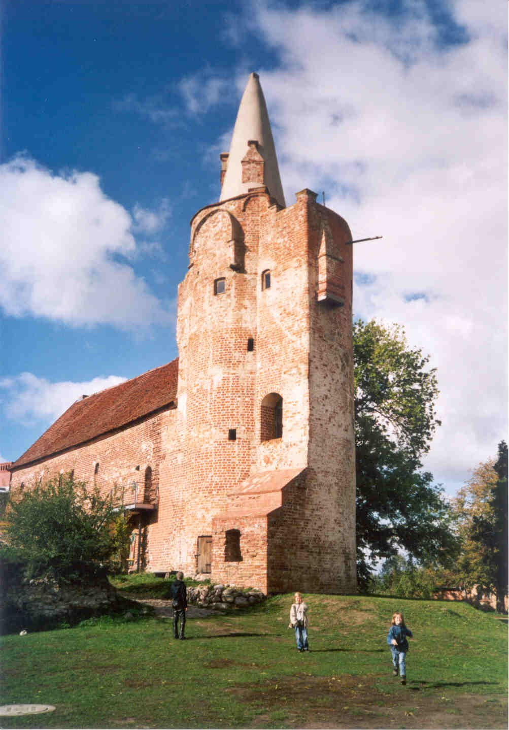 Burg Klempenow von Osten